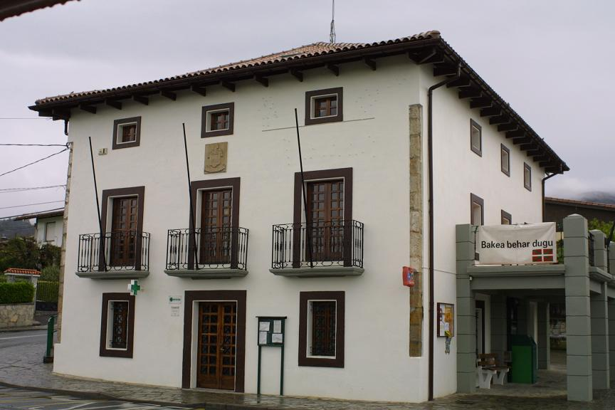 Ayuntamiento de Maruri-Jatabe Jatabeko udaletxea Town Hall in Maruri-Jatabe